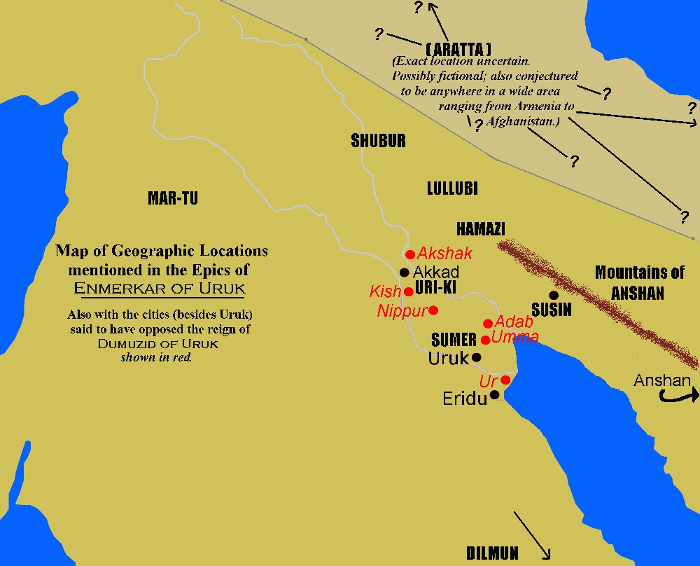 Aratta